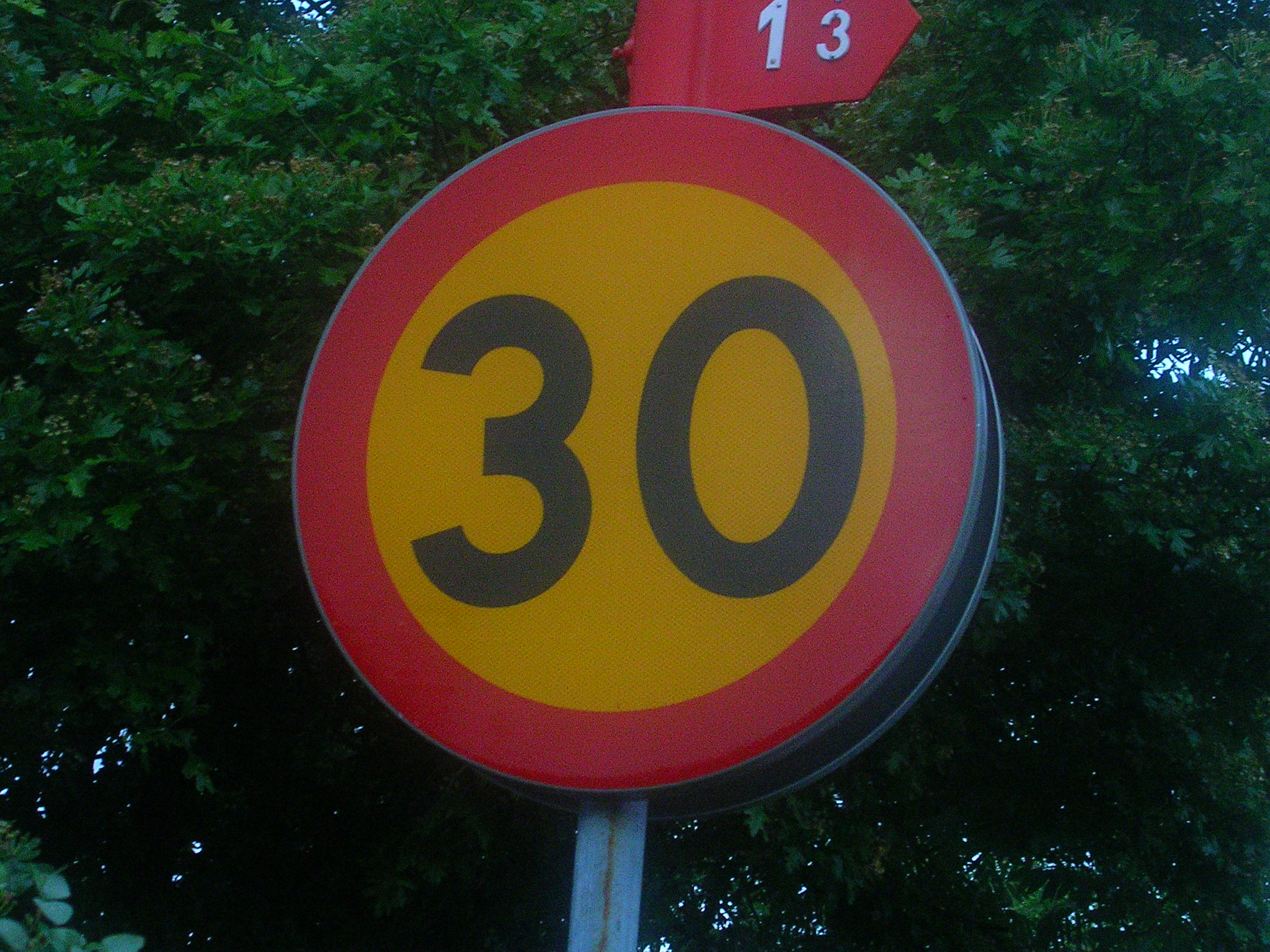 Hastighetsskylt med Brandpostflagga ovanpå.